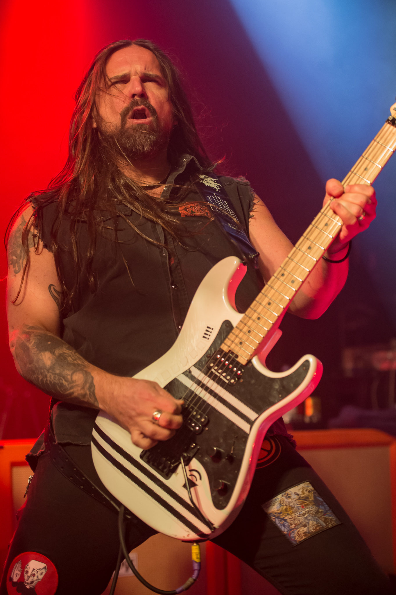 Andreas Kisser,Concertbüro Franken,Der Hirsch,Konzert,Livekonzert,Livemusik,Sepultura